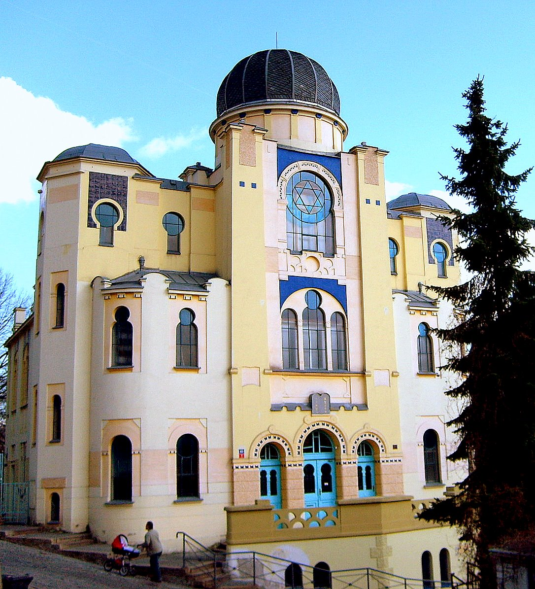 Synagoga v Děčíně-Podmoklech